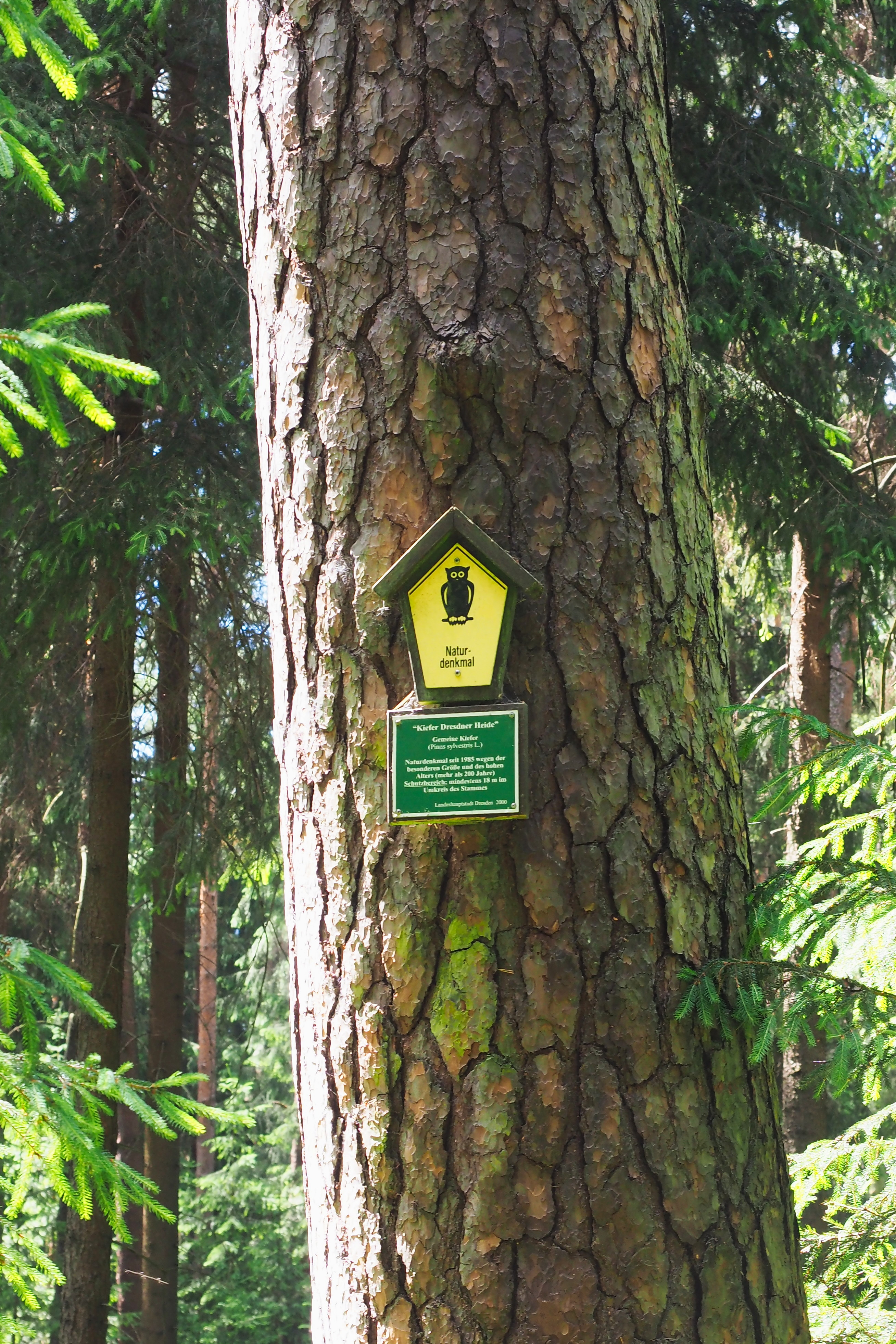 Alte Kiefer in der Dresdner Heide, Naturdenkmal